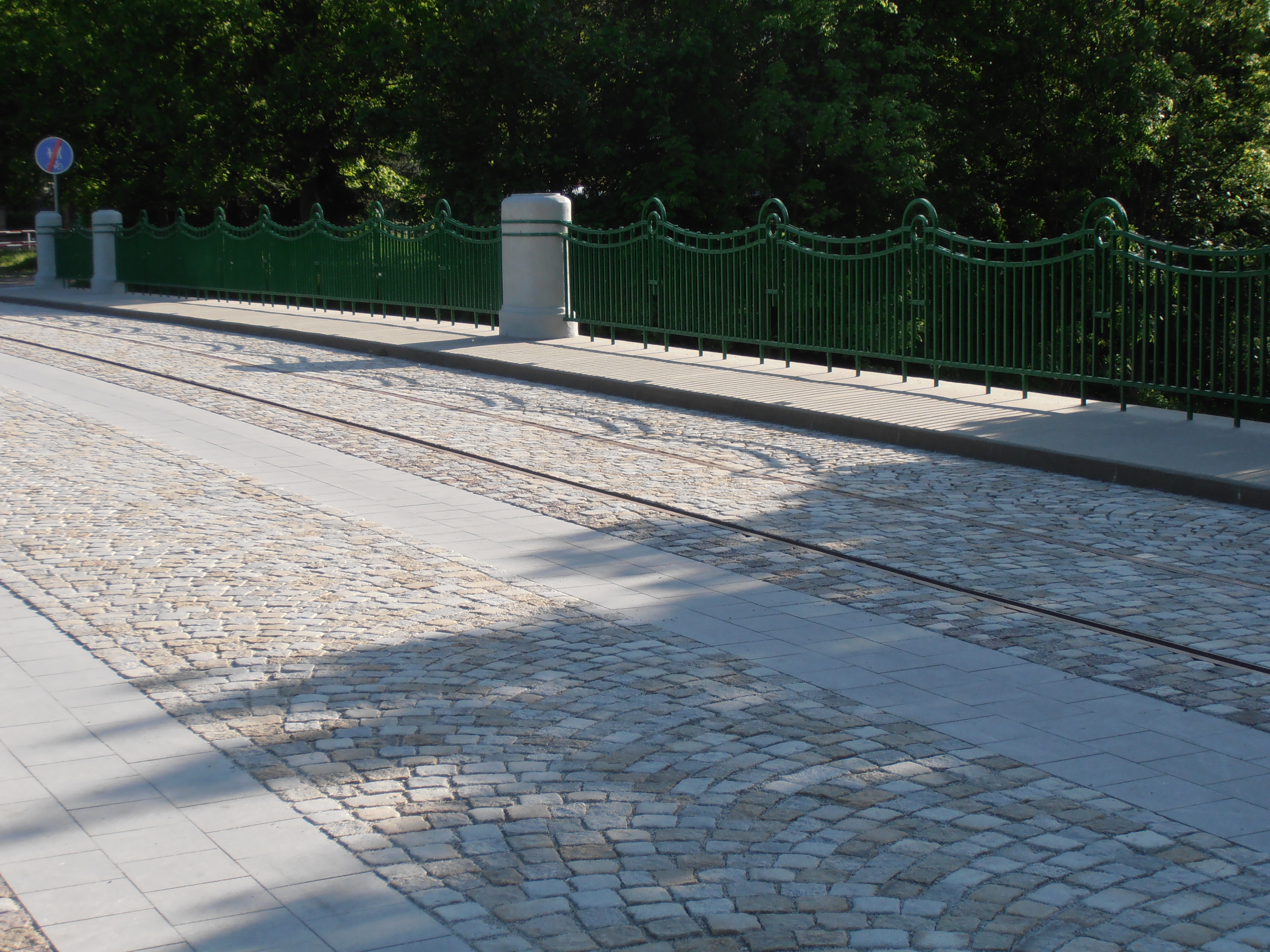 Silniční most U Jánů (Jihlava), Úvoz, přes řeku Jihlavu, Jihlava - při opravě na most nainstalována kolej z použitých žlábkových kolejnic.